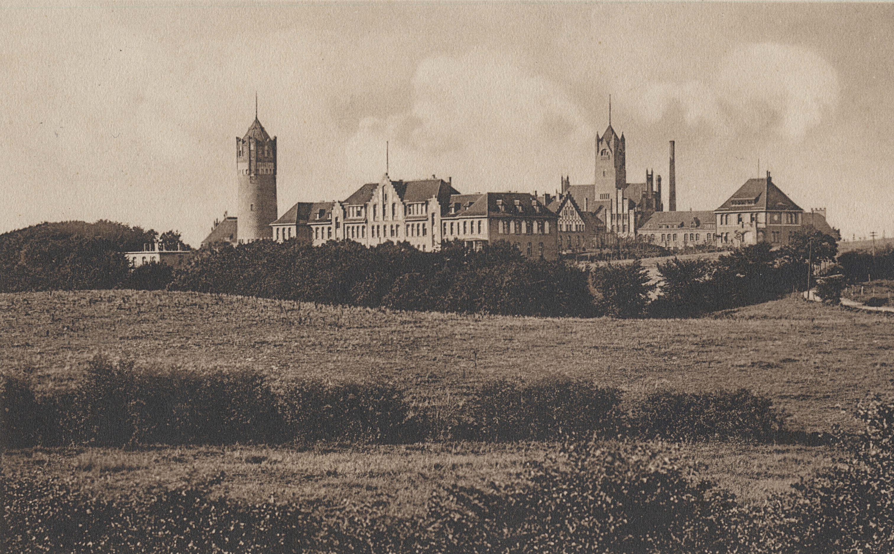 Mürwiker Burg um 1910, geerbt